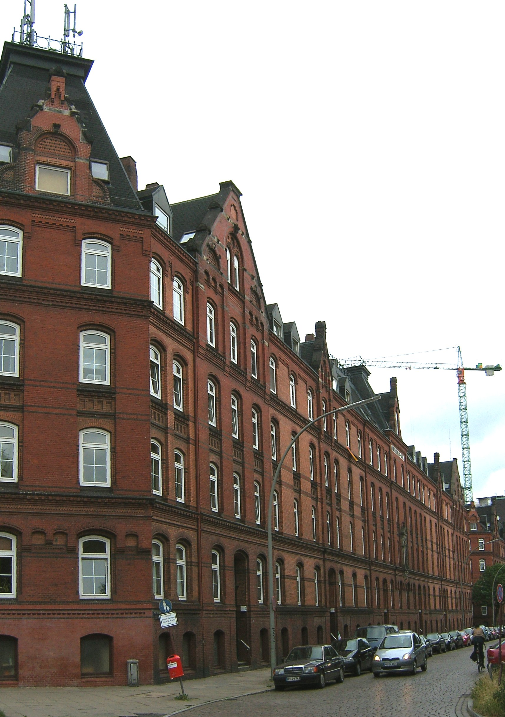 Die Kleinwohnungen (Küche und zwei Zimmer) des Abraham-Philipp-Schuldt-Stiftes an den Hütten in der Hamburger Neustadt wurden 1895/96 nach Plänen von Hinrich Fittschen erbaut. This is a photograph of an architectural monument.